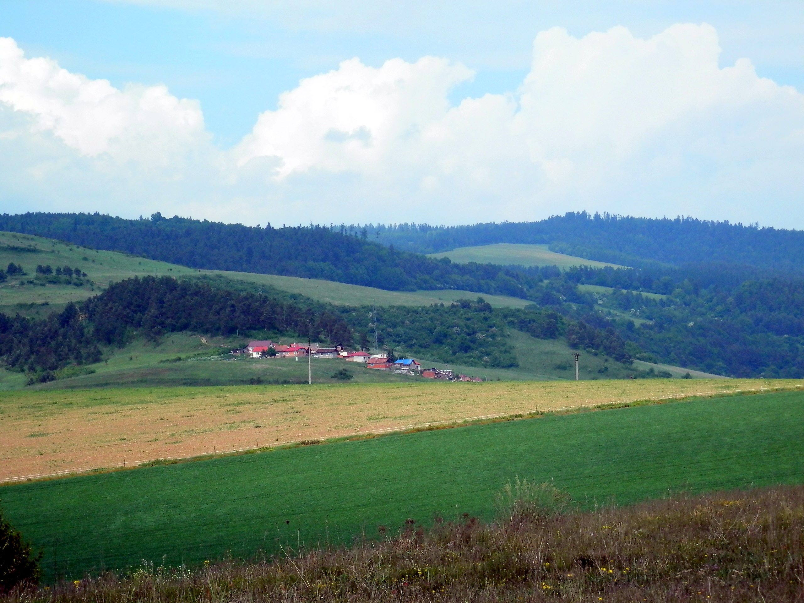 Rómska osada nad obcou Jablonov okres Levoča.